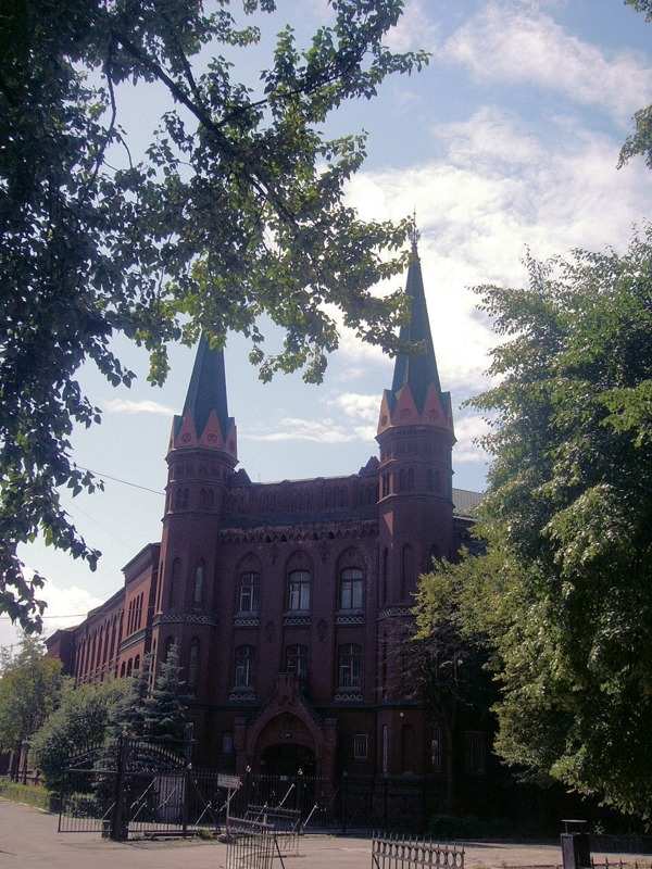 Main building of Kaliningrad Marine College Калининградский морской рыбопромышленный колледж